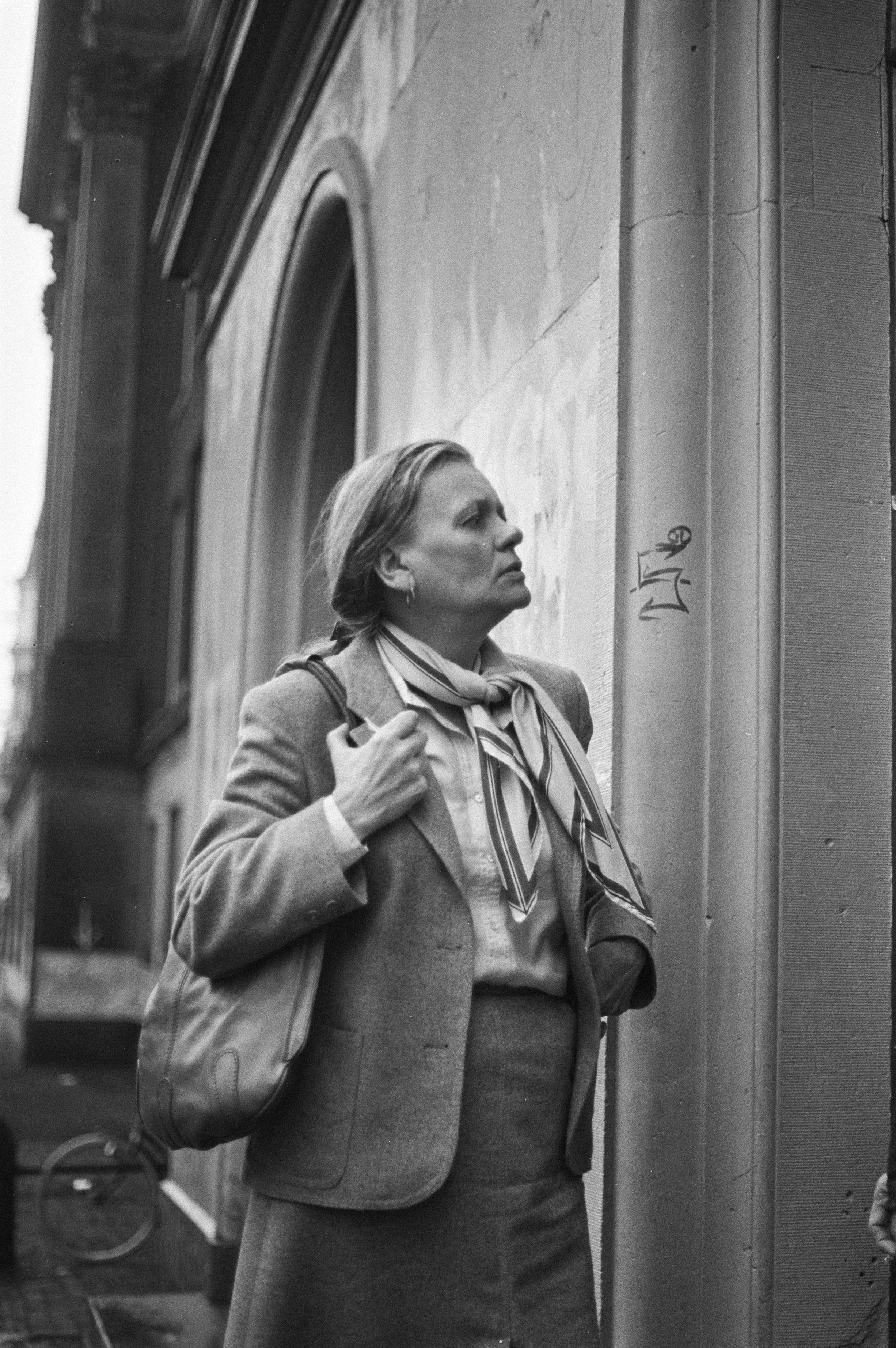 Collectie / Archief : Fotocollectie Anefo Reportage / Serie : Politieman C.V. voor de Amsterdamse rechtbank voor het dodelijk schot dat hij afvuurde op Meta Hofman op 12 augustus j.l. Beschrijving : Tiny Hofman (moeder van Meta Hofman) bij de ingang van het Paleis van Justitite in Amsterdam Datum : 20 november 1981 Locatie : Amsterdam, Noord-Holland Trefwoorden : moeders, rechtbanken Persoonsnaam : Hofman, Tiny Fotograaf : [onbekend] Auteursrechthebbende : Nationaal Archief Materiaalsoort : Negatief (zwart/wit) Nummer archiefinventaris : bekijk toegang 2.24.01.05 Bestanddeelnummer : 931-8142